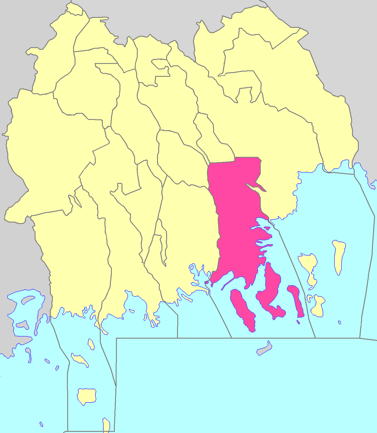 Каралатське сільське поселення